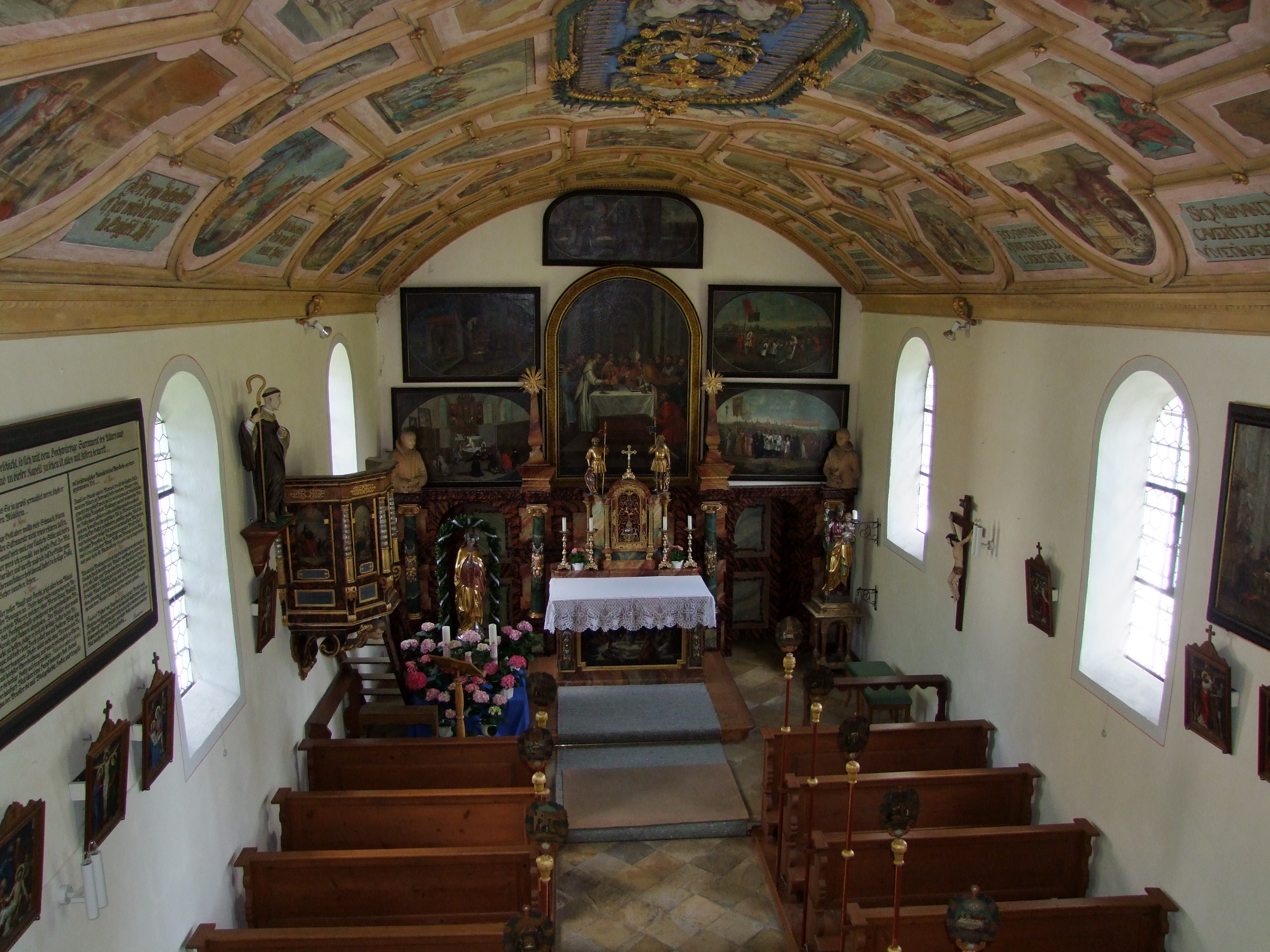 Schiff der Riedkapelle in Benningen